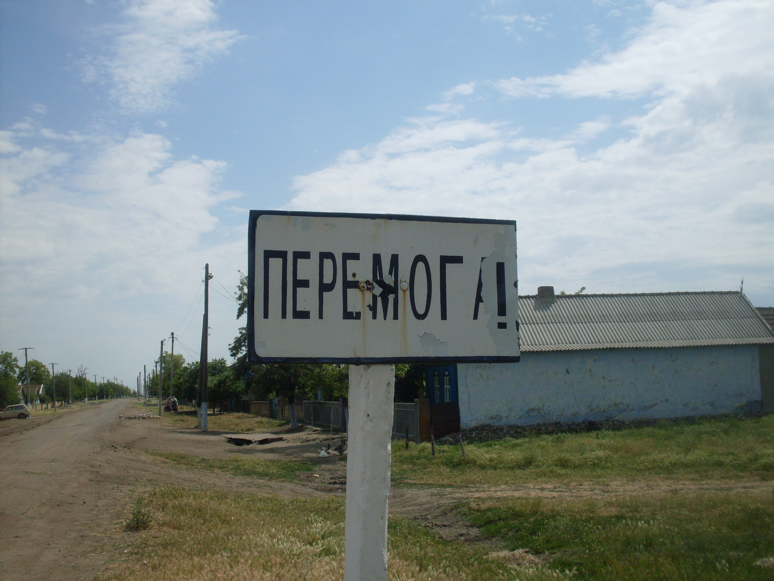 с. Перемога Тарутинского района. Основано в 1922 г переселенцами из Виноградовки (Чумлекиой) Тарутинского района